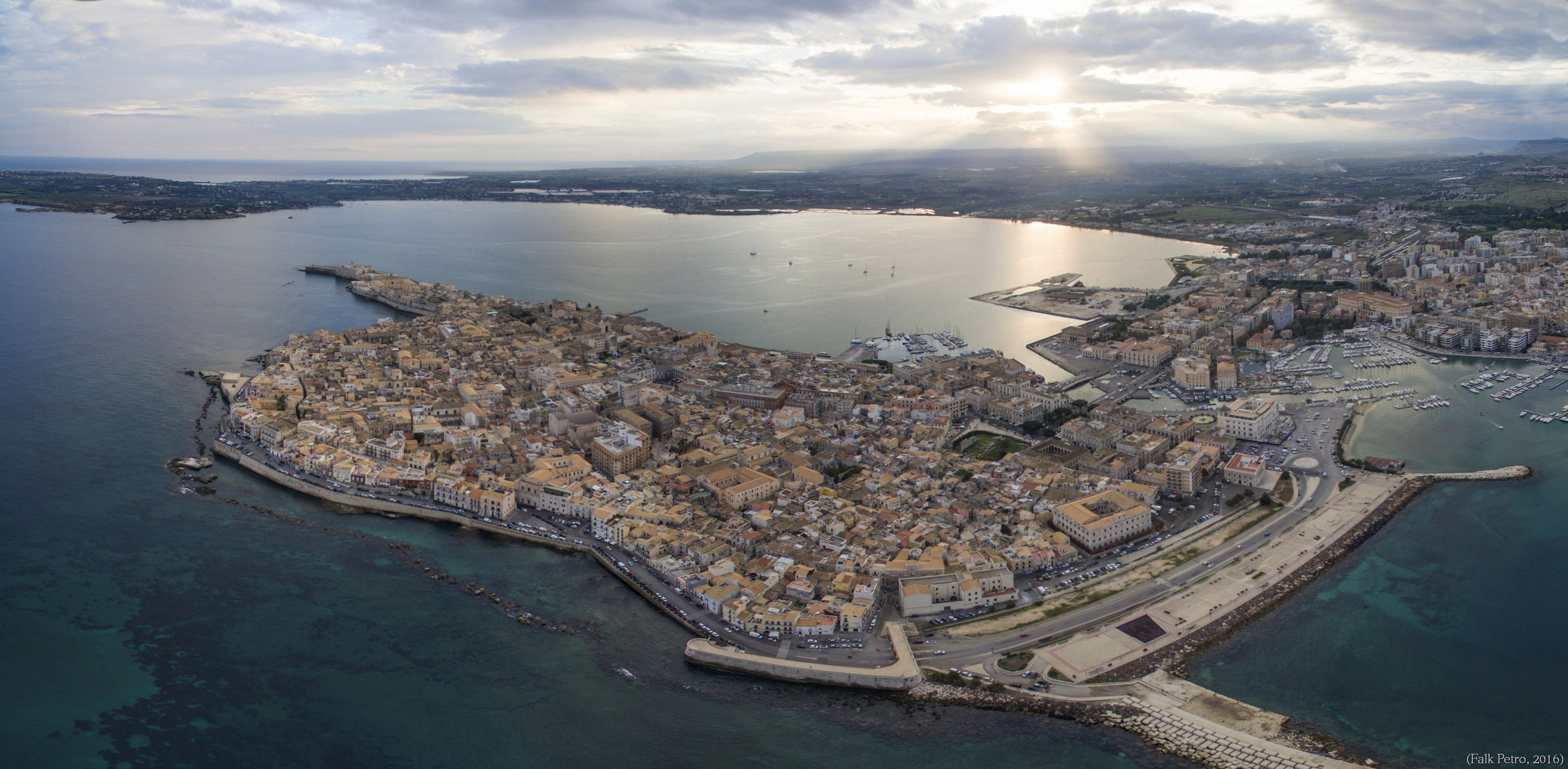 Luftpanorama von Syrakus